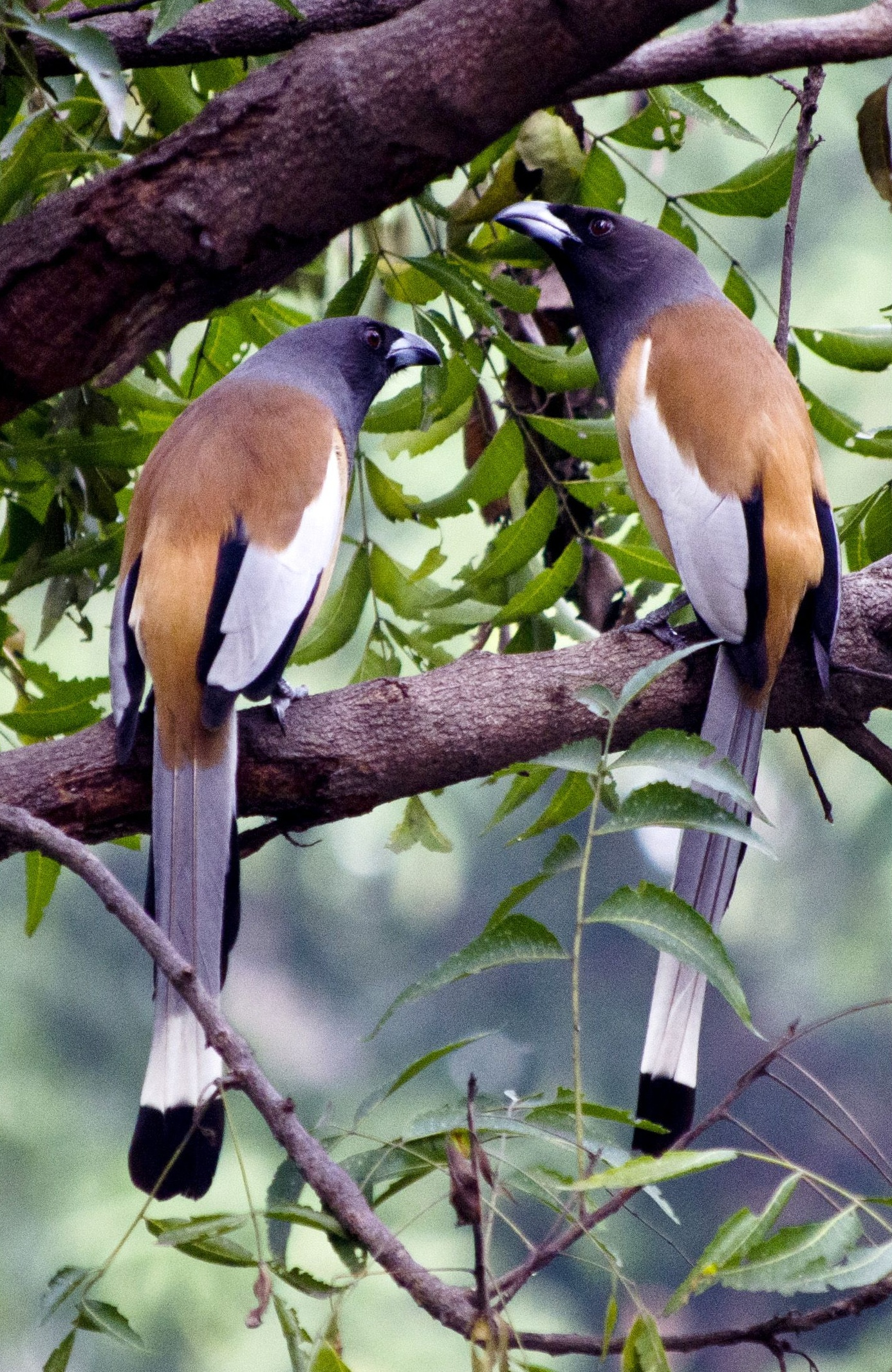 Rufous Treepie